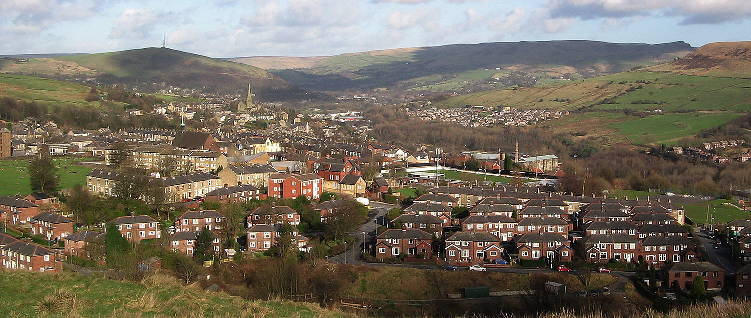 Mossley